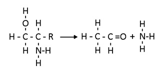 reaccion global de la eliminación del amoniaco